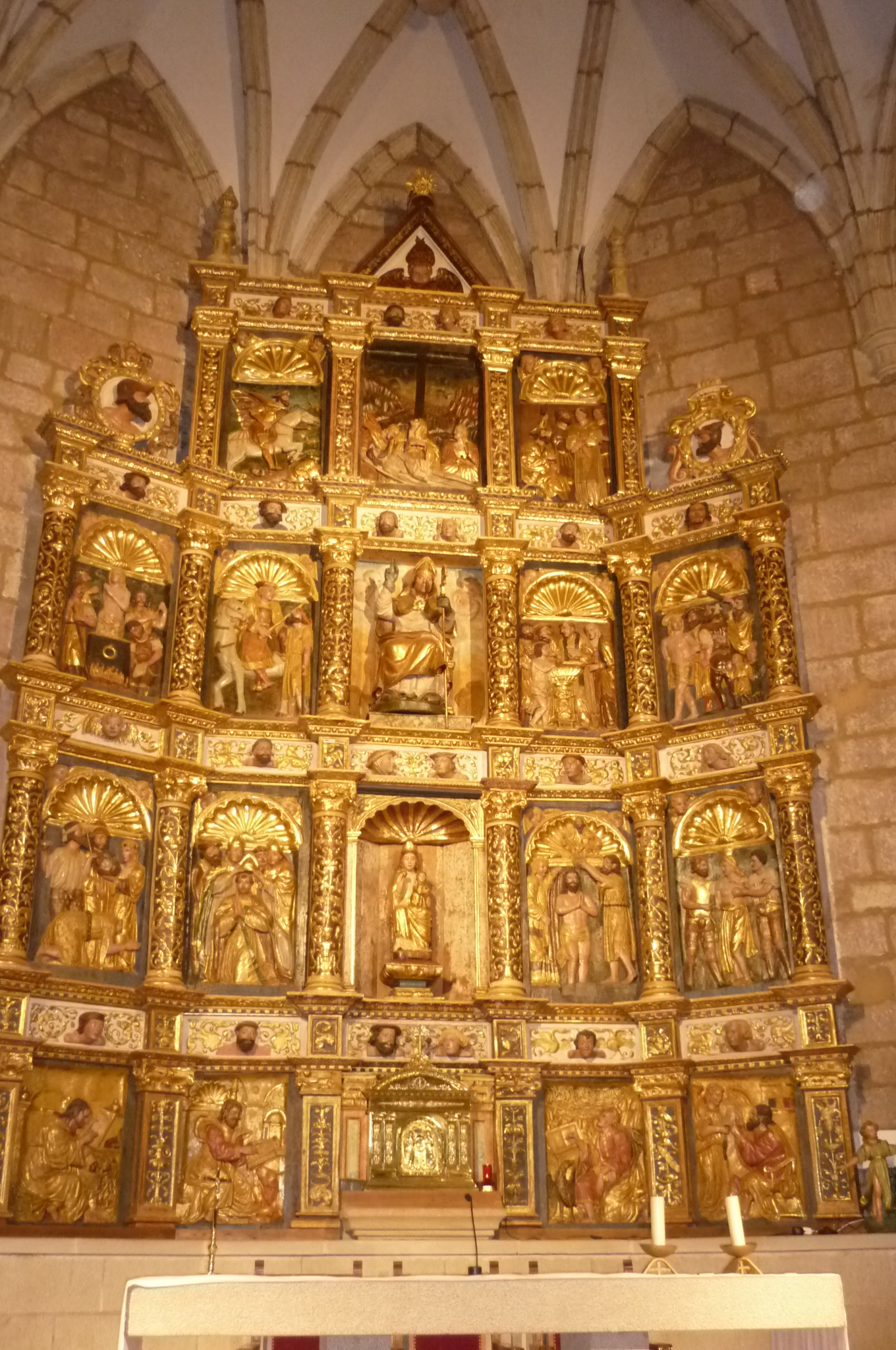 Retablo de la iglesia parroquial de Alesón (La Rioja, España)